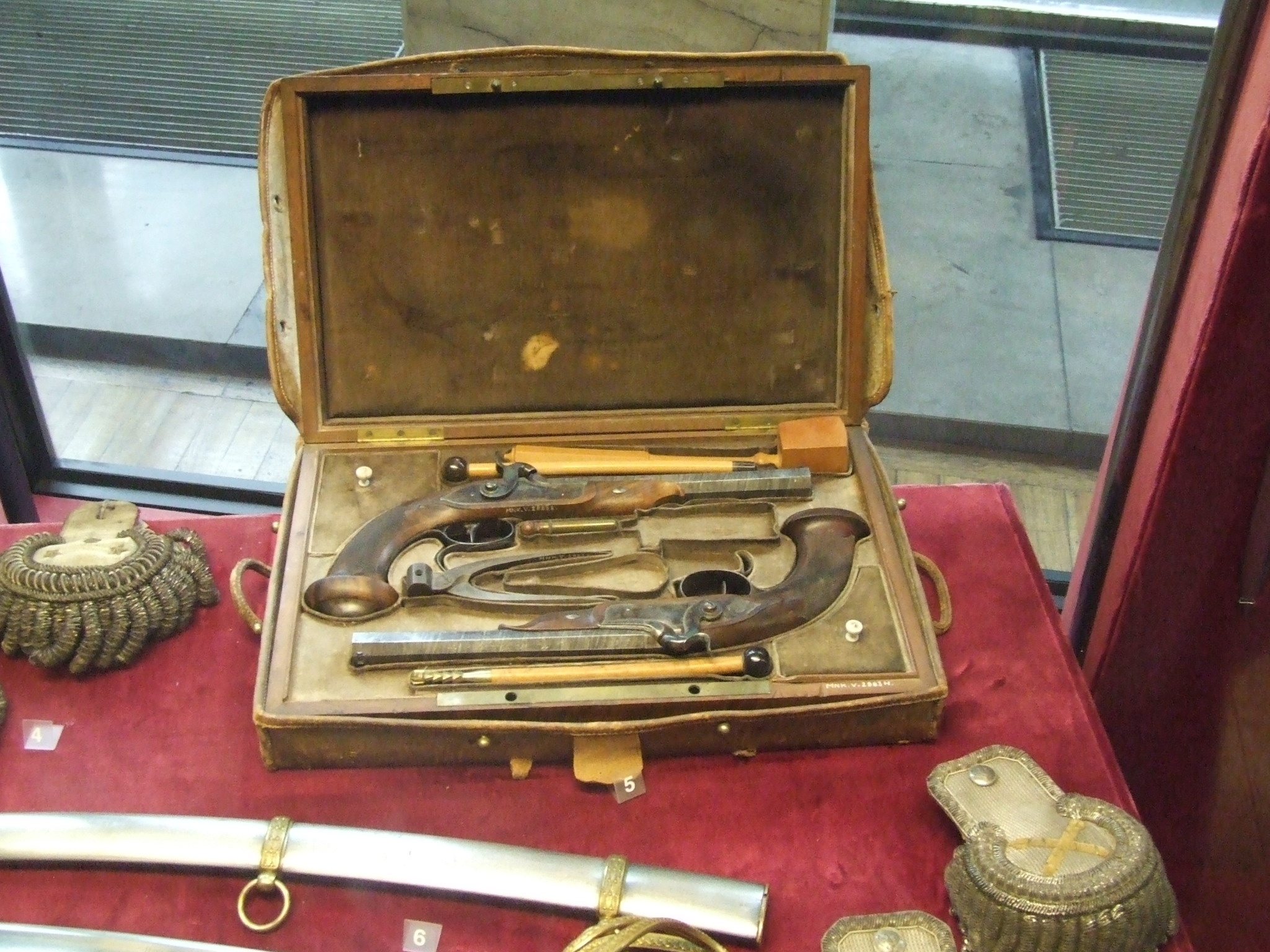 Pistolety darowane Józefowi Chłopickiemu przez Gen. Lafayeta w 1830 r.